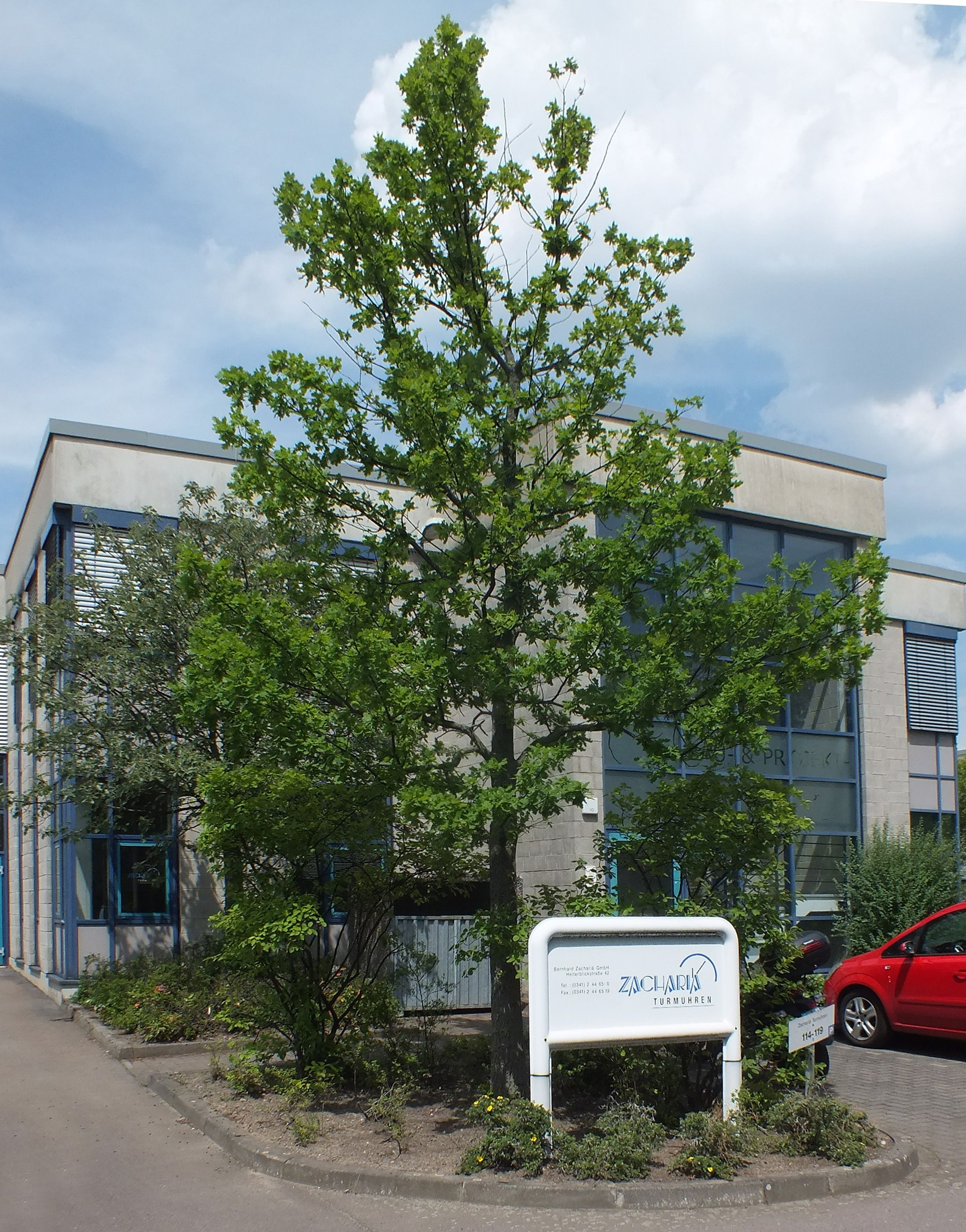 Produktionsstätte der Leipziger Turmuhrenfabrik Bernhard Zachariä GmbH seit 1995